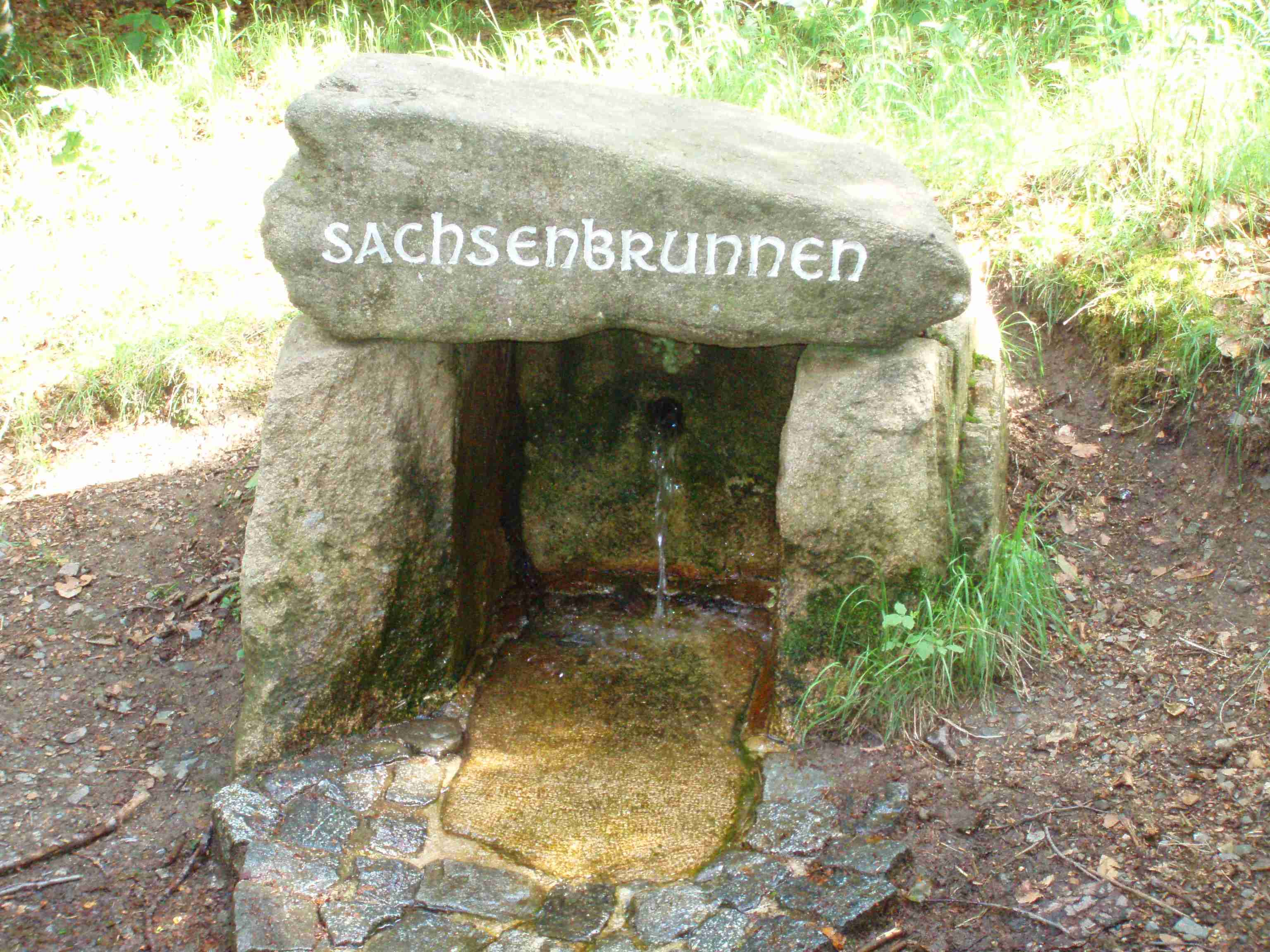 Sachsenbrunnen